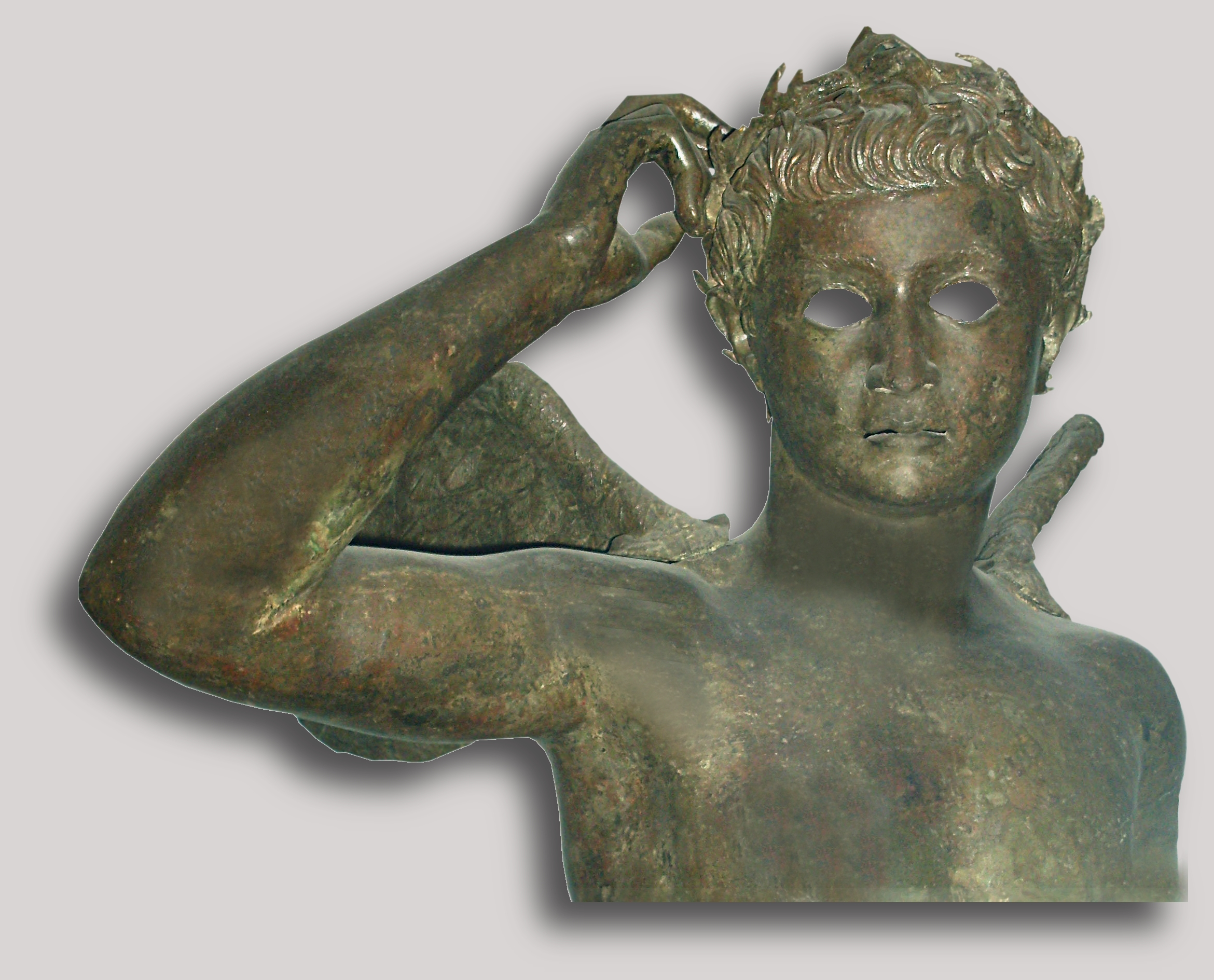 Musée Bardo, Agon, Fouilles sous marine de Mahdia